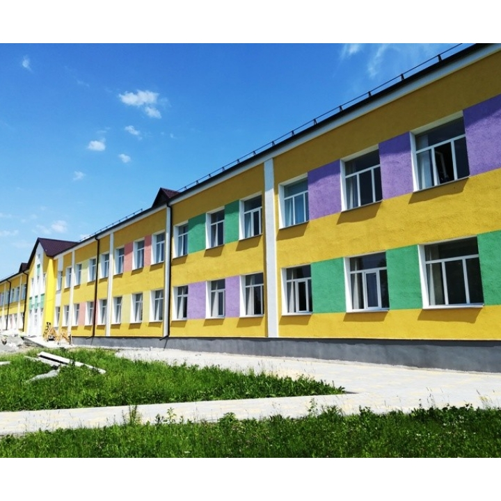 Школа. будівля